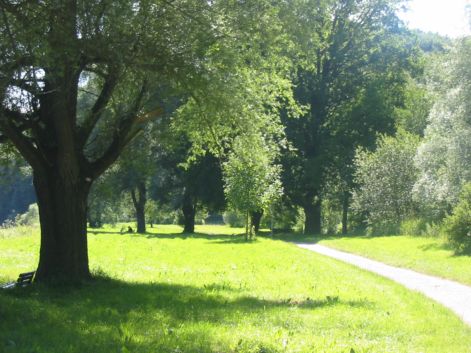 Bildbeschreibung: Radweg bei Wipfelsfurt Fotograf/Zeichner: Karl Konzok Quelle: Selbst fotografiert Datum:2003 Freigabe: OTRS Ticket#: 2006070310013135